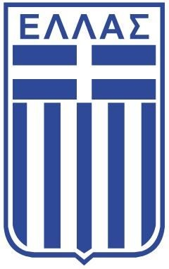 Greek national basketball team of 1987 logo